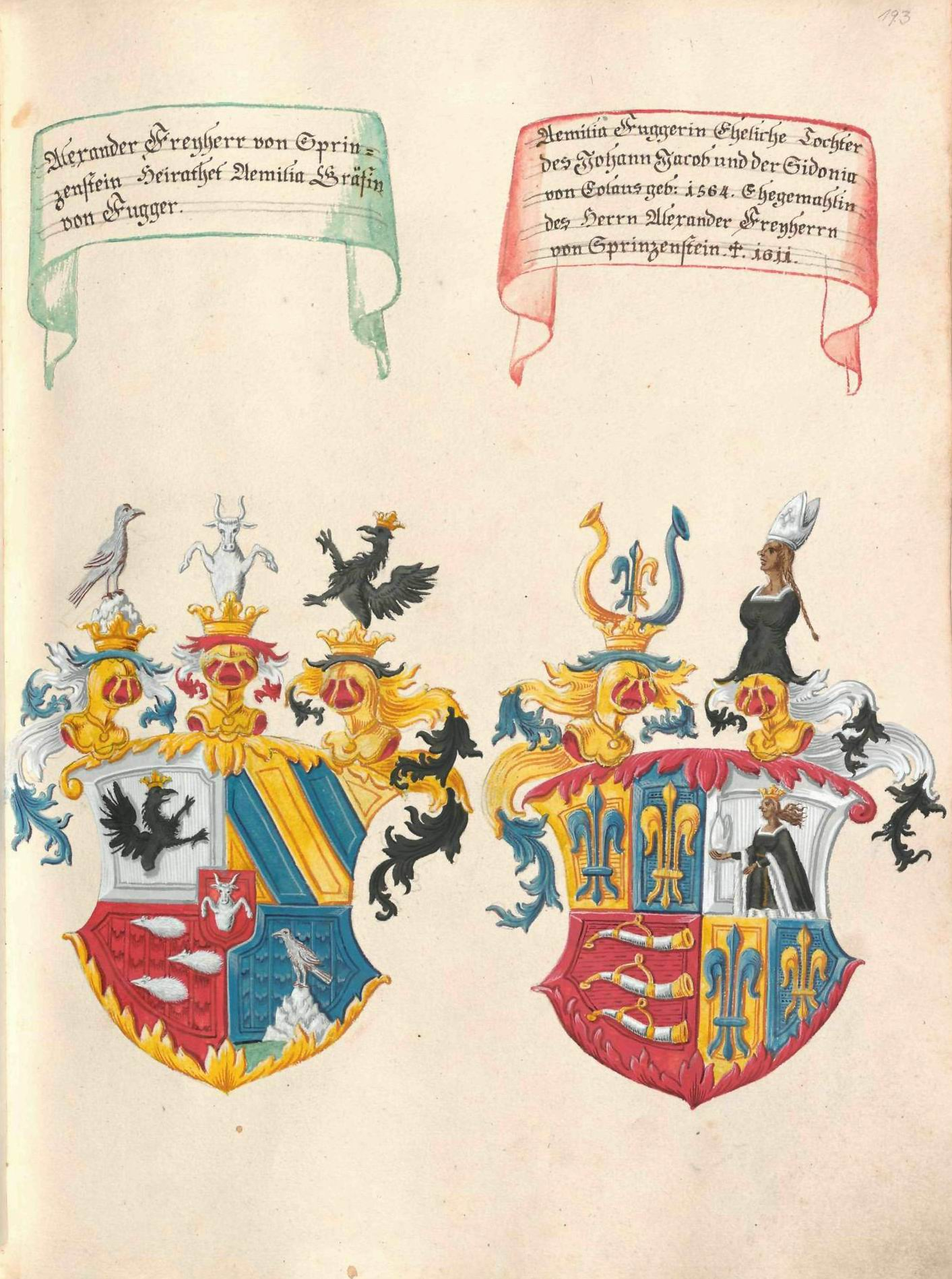 Geheimes Ehrenbuch der Fugger Nachtrag (16.–19. Jh.)